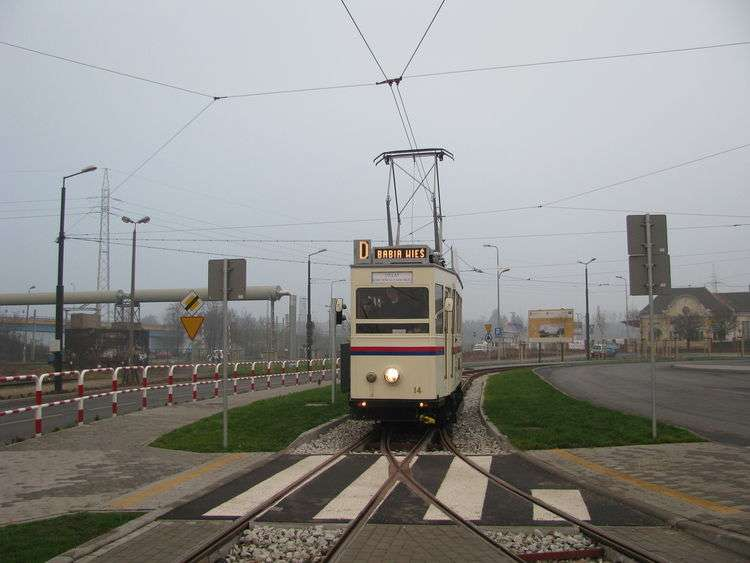 Linia D